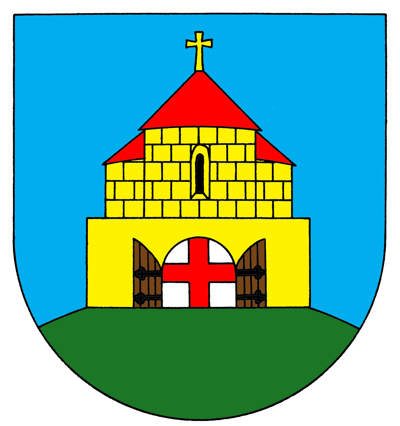 znak obce